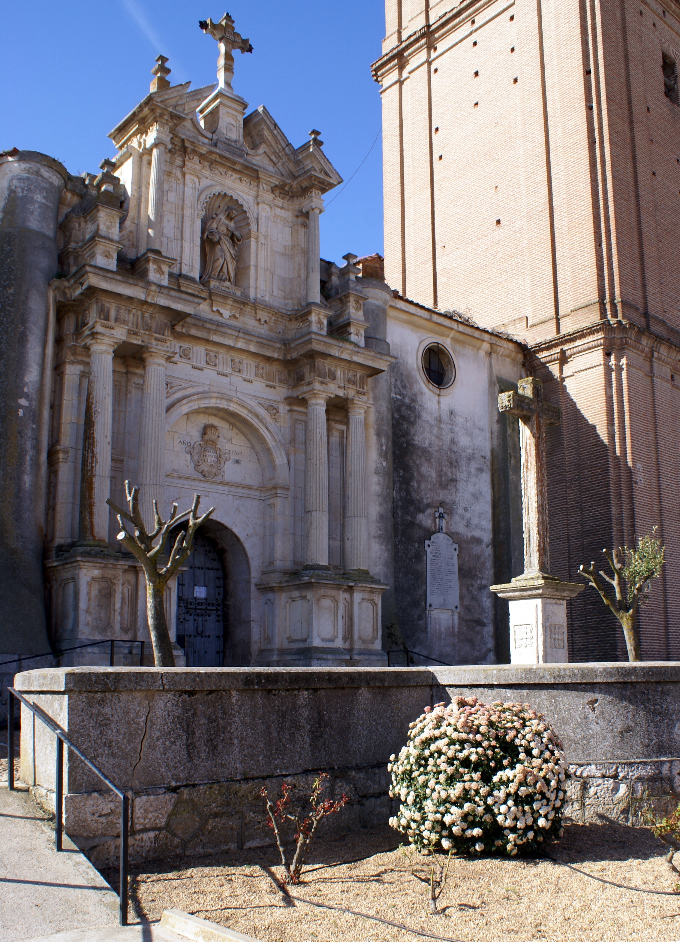 Fachada principal, atrio y crucero de la iglesia de Santa María Magdalena de Matapozuelos, Valladolid, España.